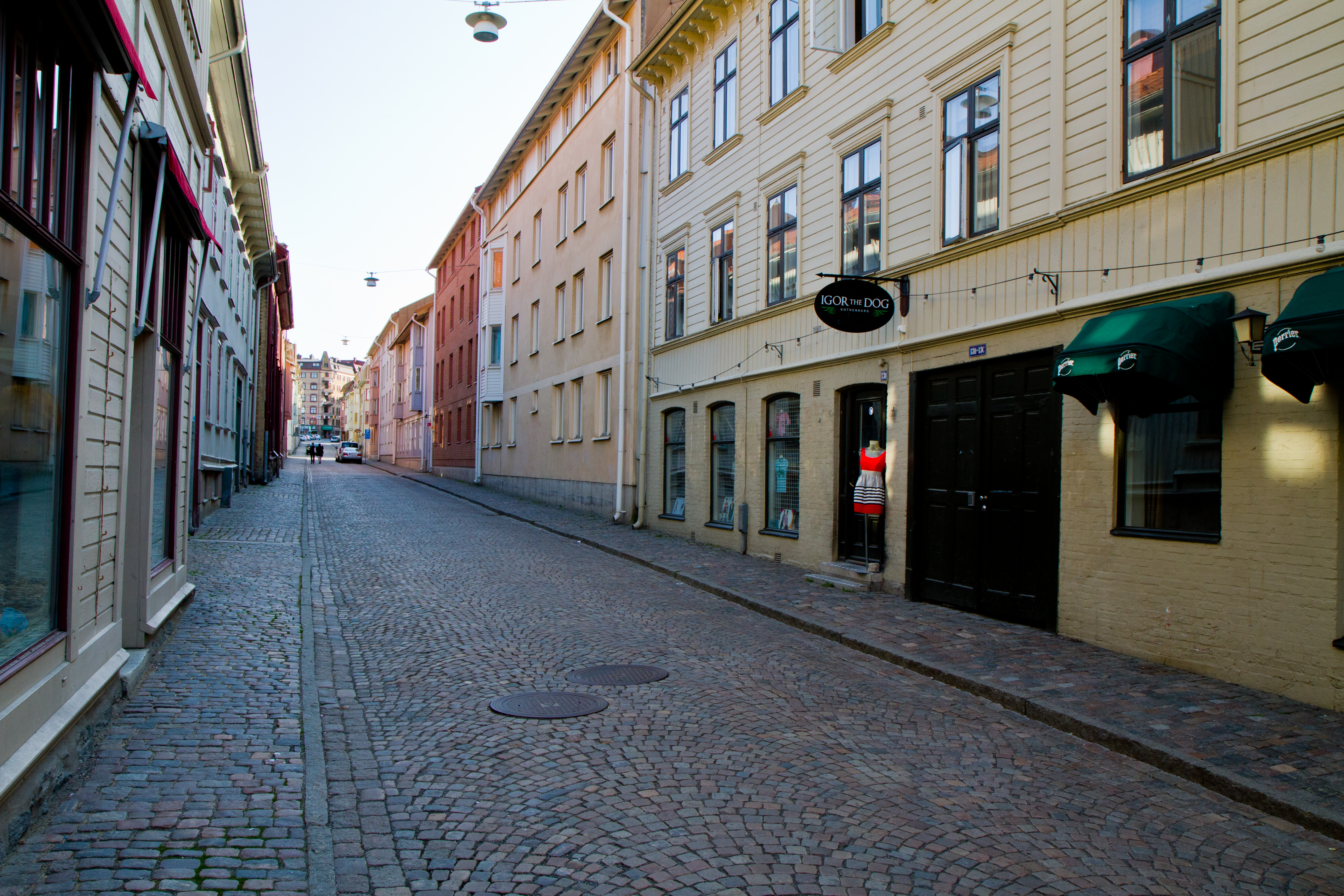 Skolgatan, Maj 2011